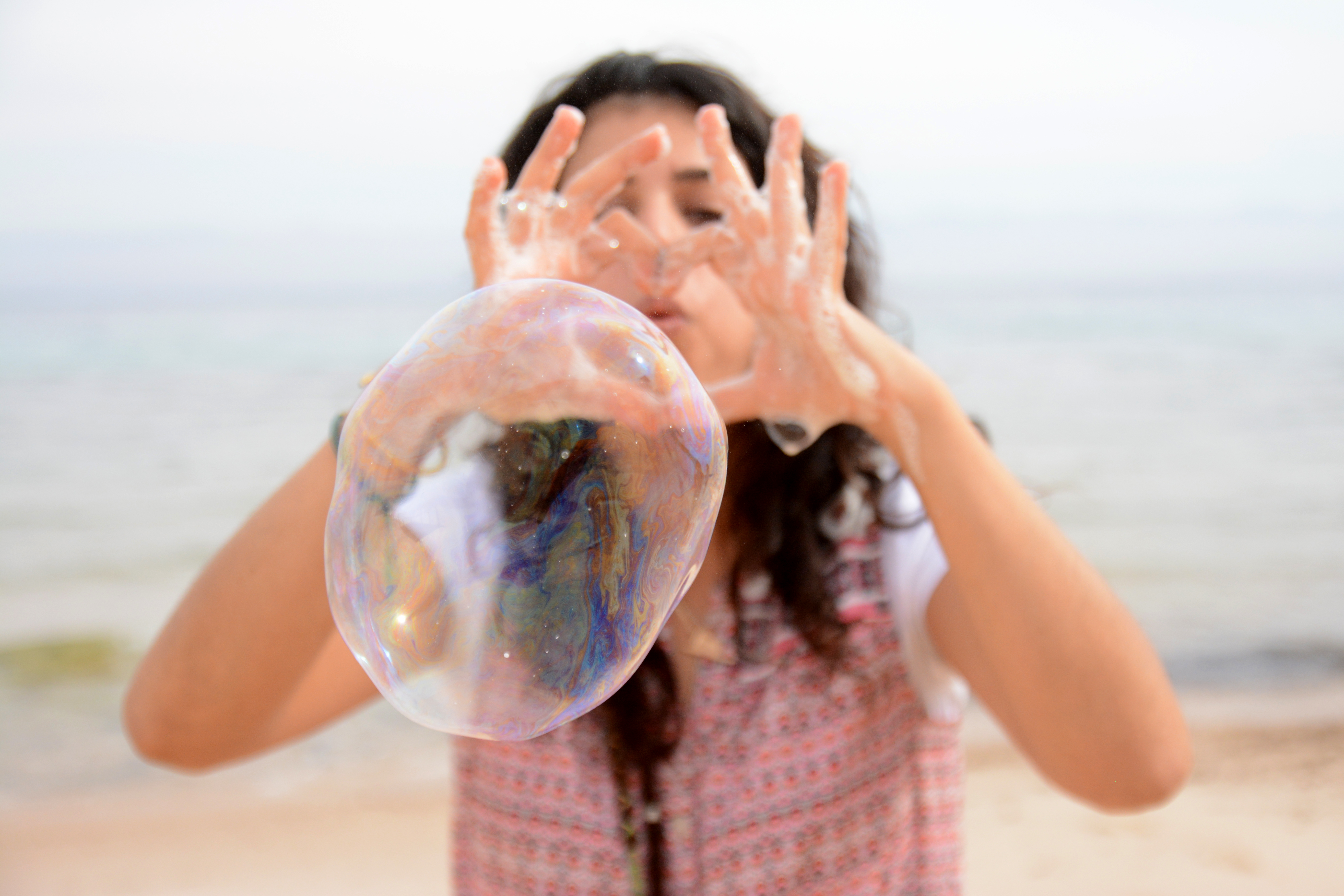 הפרחת בועות סבון בהכנה ביתית